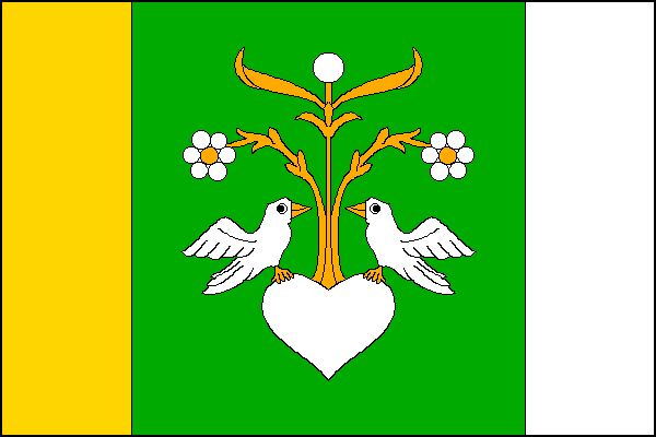 vlajka, Milenov ,okres Přerov